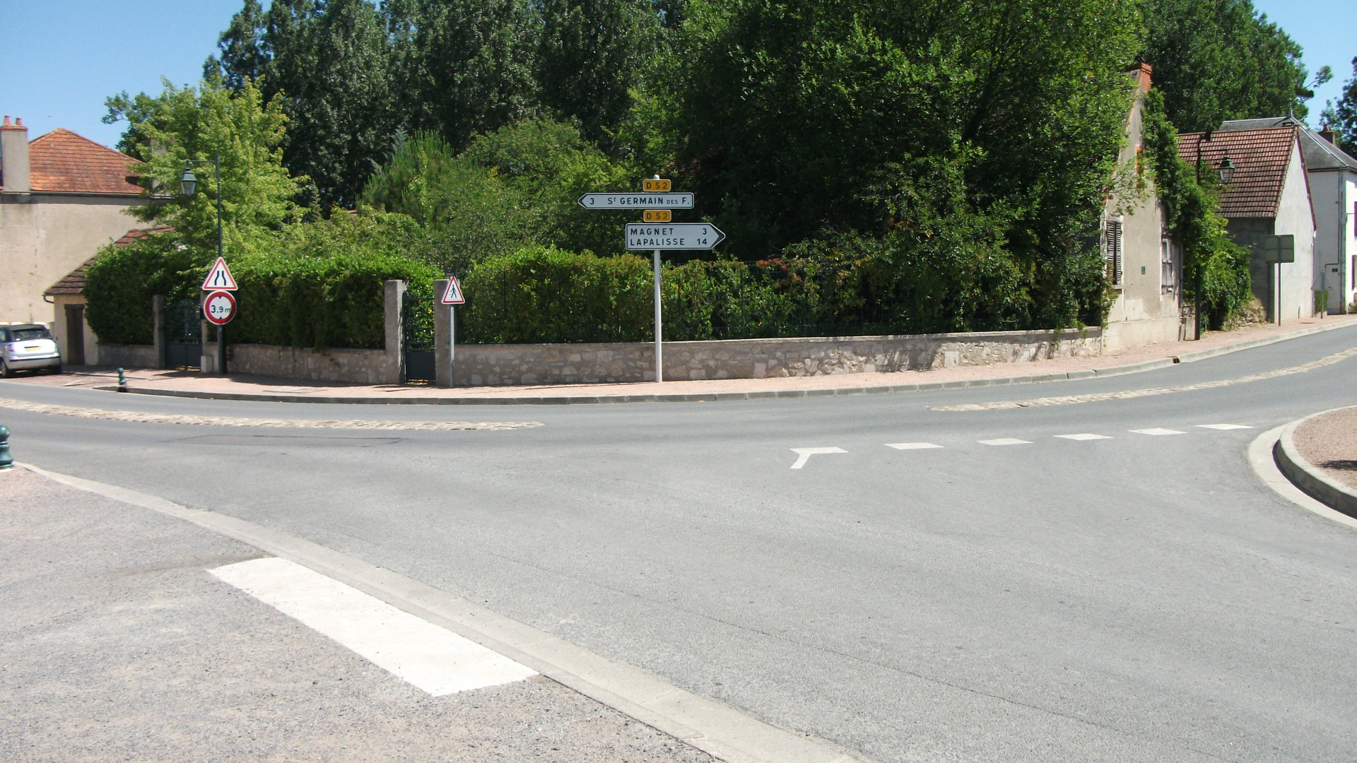 La Départementale 52 à Seuillet. À l'ouest, en direction de Saint-Germain-des-Fossés. À l'est, en direction de Magnet et Lapalisse. panneaux : SES - 1991